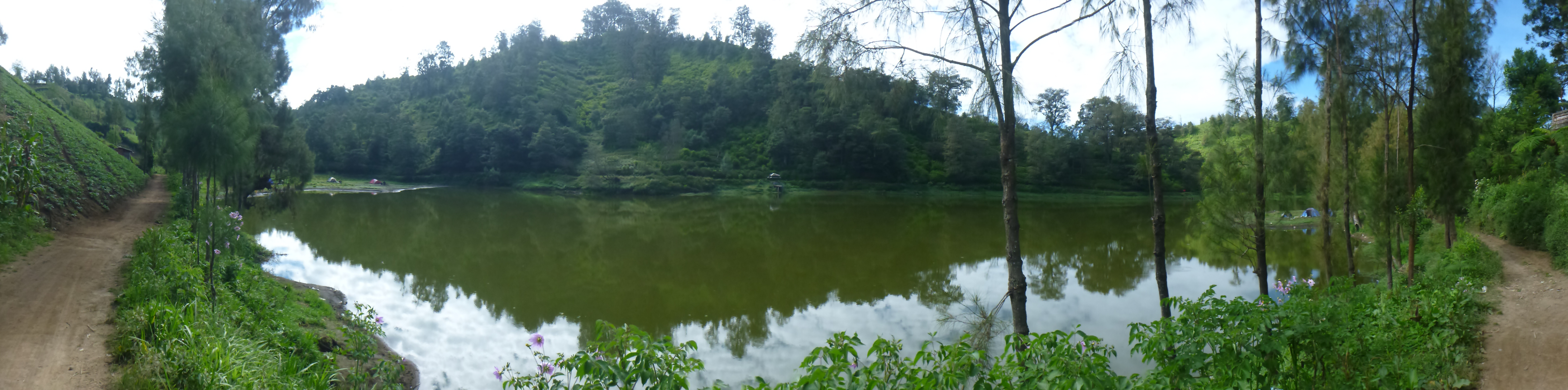 Panorama of Ranu Pani, 8 June 2014